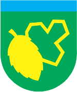 Grb občine Žalec.